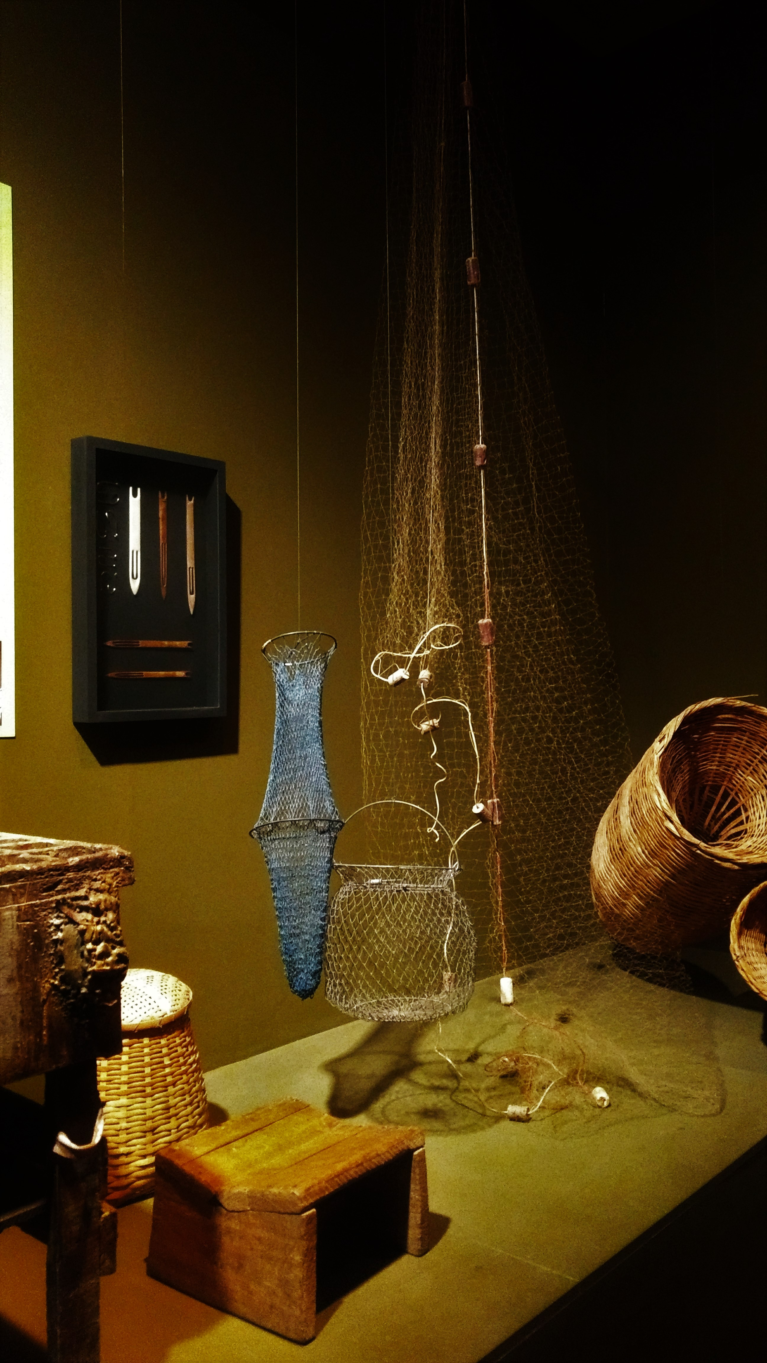 Obra exposta na "Sala Brasil", de pesqueiros, localizado no interior da casa um do Museu do Folclore de São José dos Campos, Brasil.